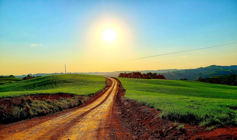 Fotografia de uma estrada com dois pedaços de terra com plantações marcam a paisagem rural de Tunápolis, este que é município de Santa Catarina no Brasil.